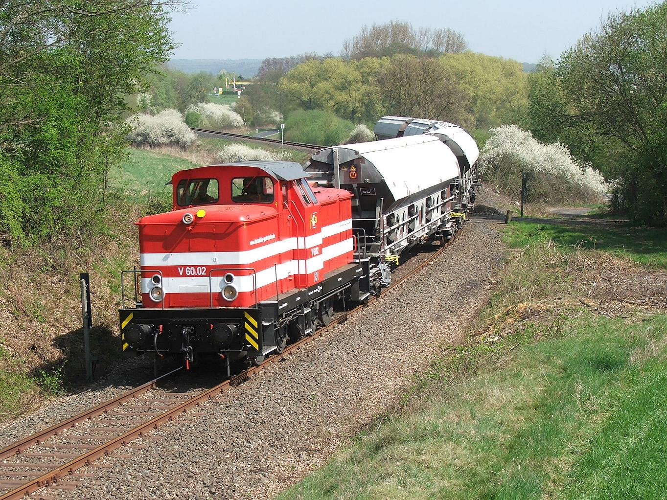 V 60.02 der hessischen Güterbahn mit Leerzug auf dem Weg von Mainzlar nach Lollar in Höhe BÜ km 24,642, gerade den Einschaltkontakt für Bü km 25,170 passierend